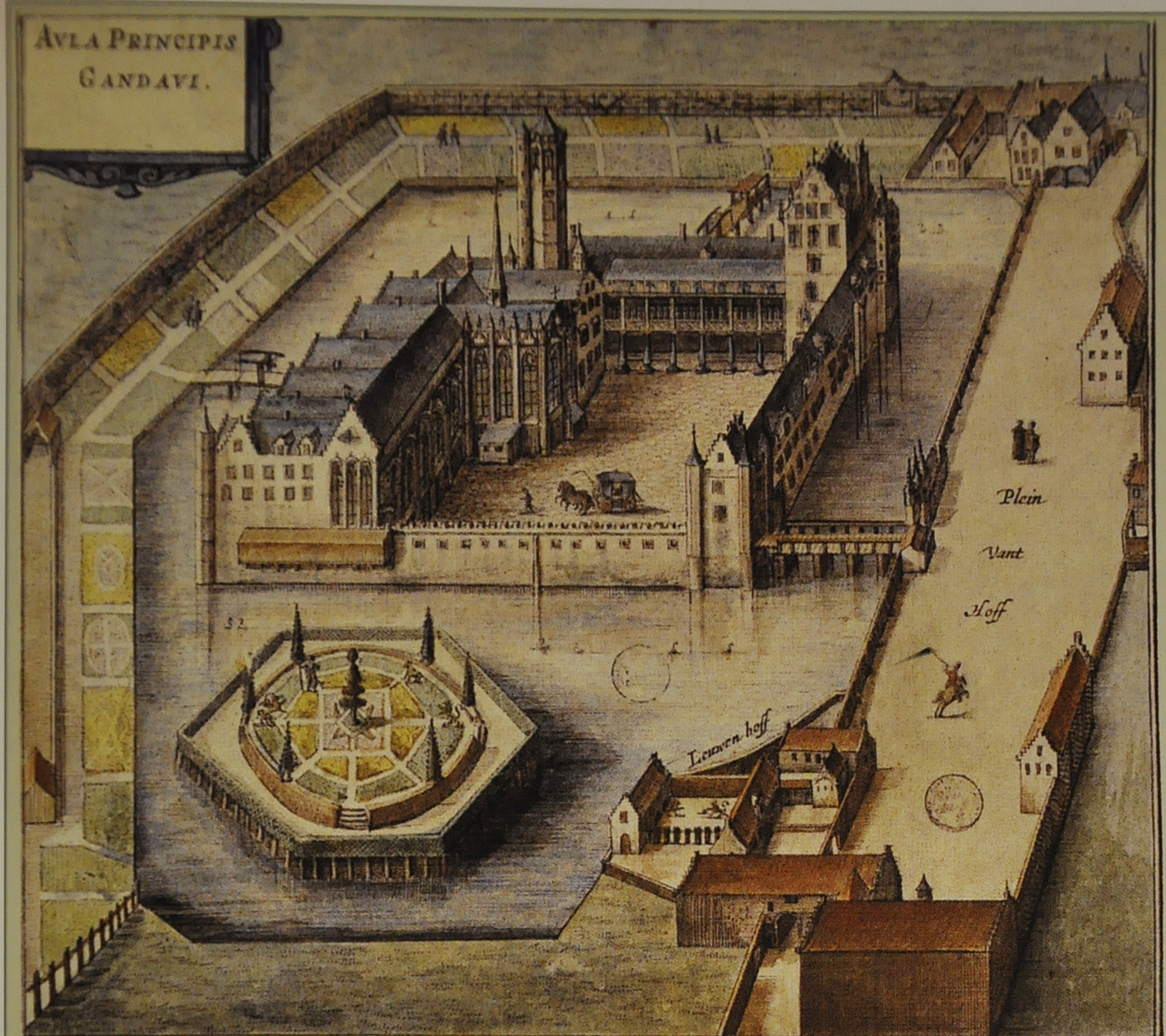 Het Prinsenhof - ingekleurde gravure van Antonius Sanderus uit 1641 - bewerkt door de uploader